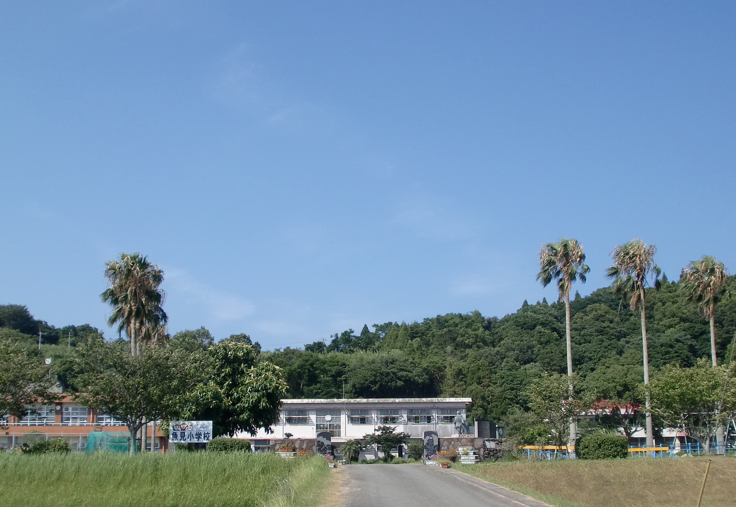 指宿市立魚見小学校の外観。